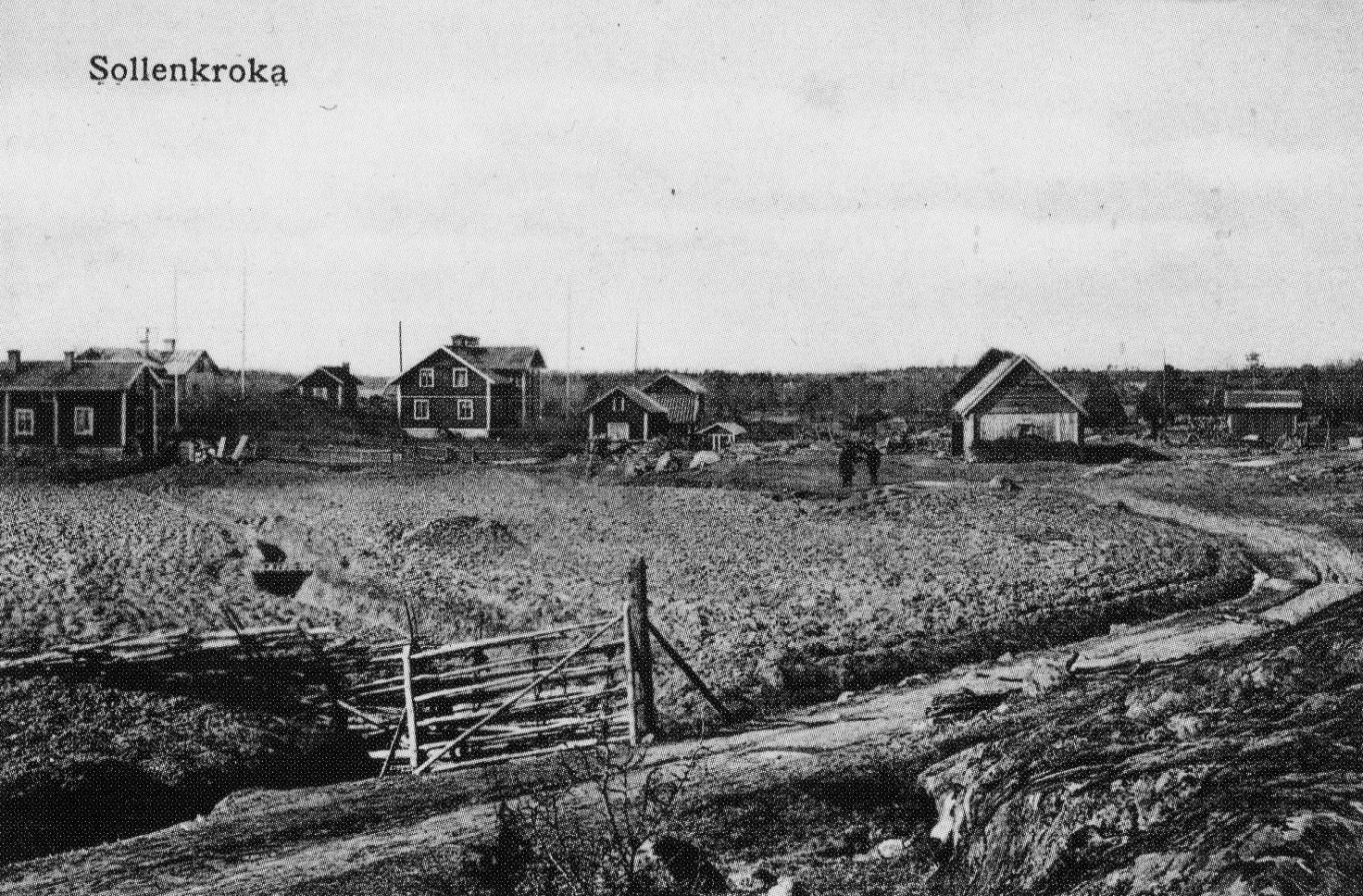 Sollenkroka på ett äldre vykort